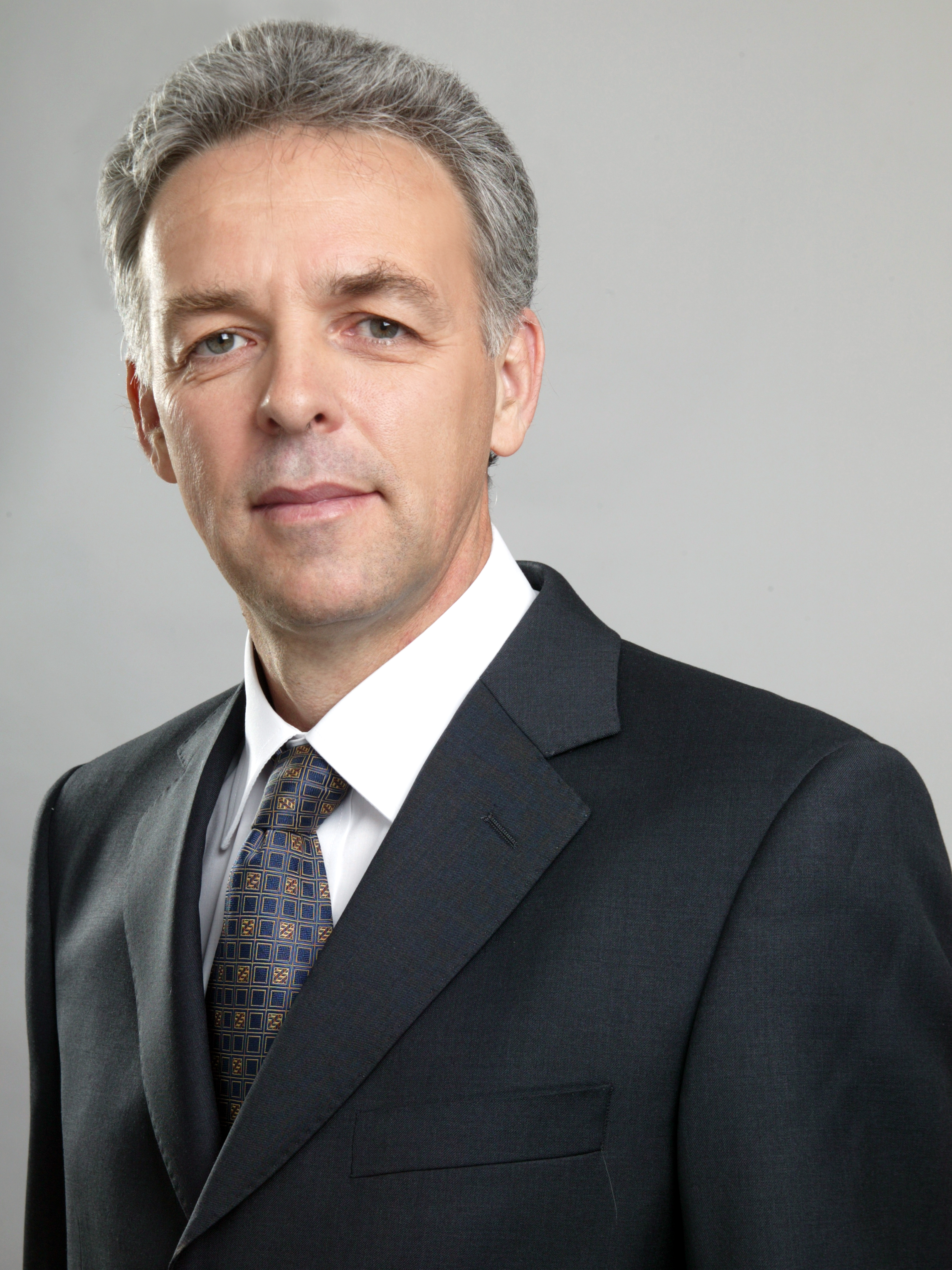 Ricardo Raineri, economista chileno.